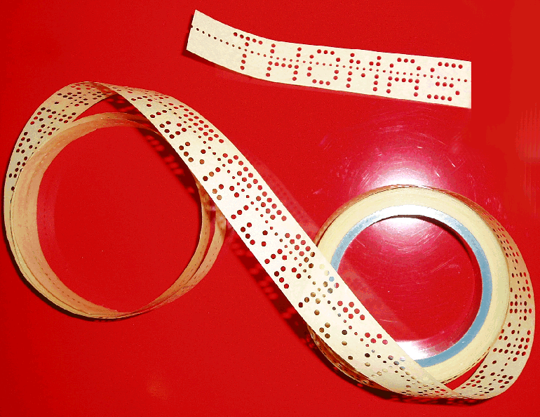 5-Bit-Lochstreifen ca. 1976. Hinweis: Der im Bild oben zu sehende kleine Teil eines Lochstreifen zeigt so etwas wie ASCII-Art, hier eher Baudot-Art zu nennen: mit Hilfe der Codeworte des Baudot- oder CCITT-2 Codes werden für den Menschen direkt lesbare Zeichen (hier: das Wort THOMAS) erzeugt.